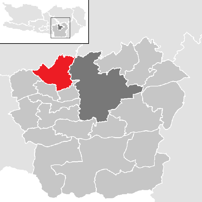 Bezirk Klagenfurt-Land